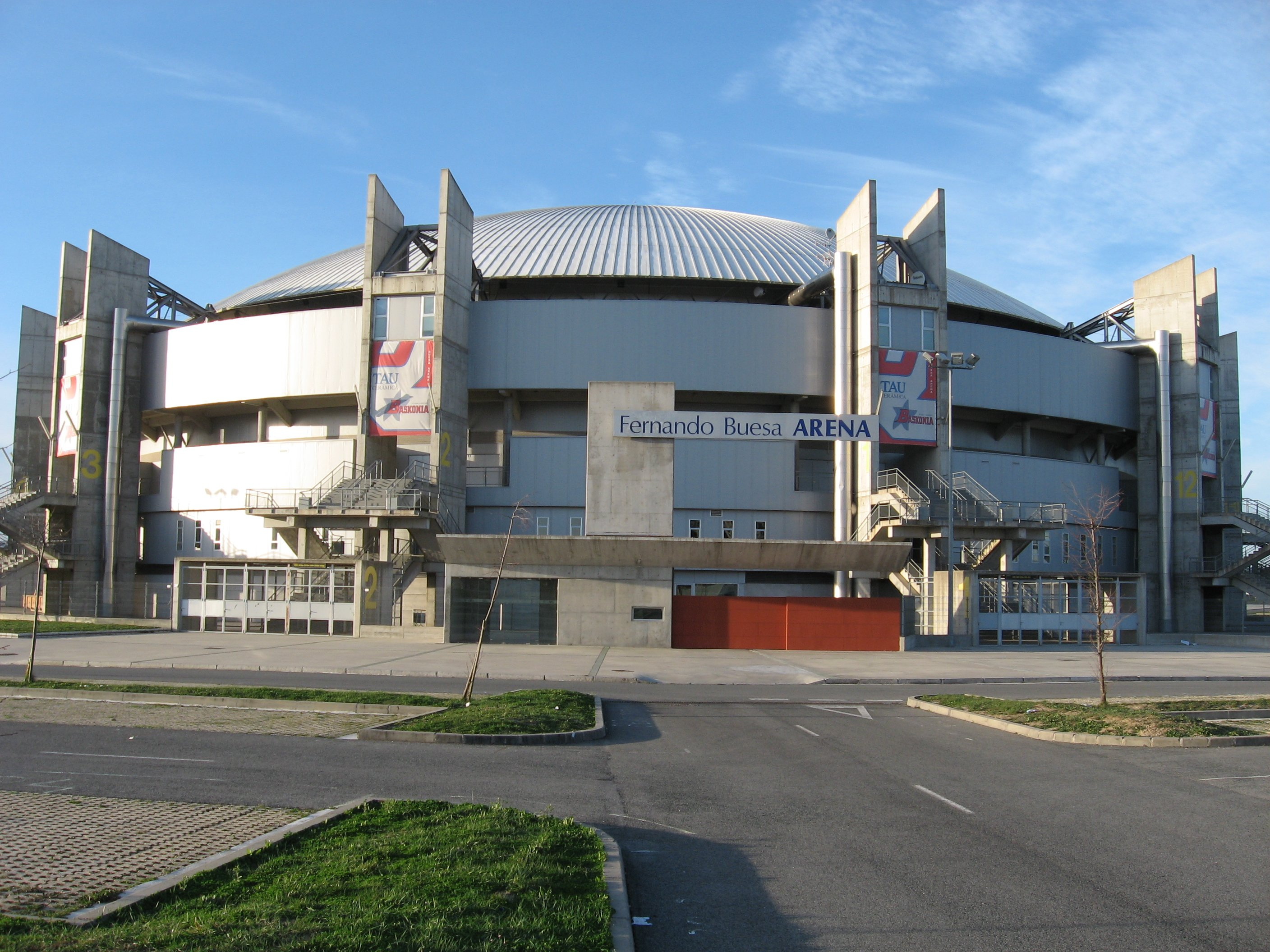 Desc: Pabellón Fernando Buesa Arena en Vitoria (Spain), es el pabellón de baloncesto donde juega el TAU. Author: Yrithinnd